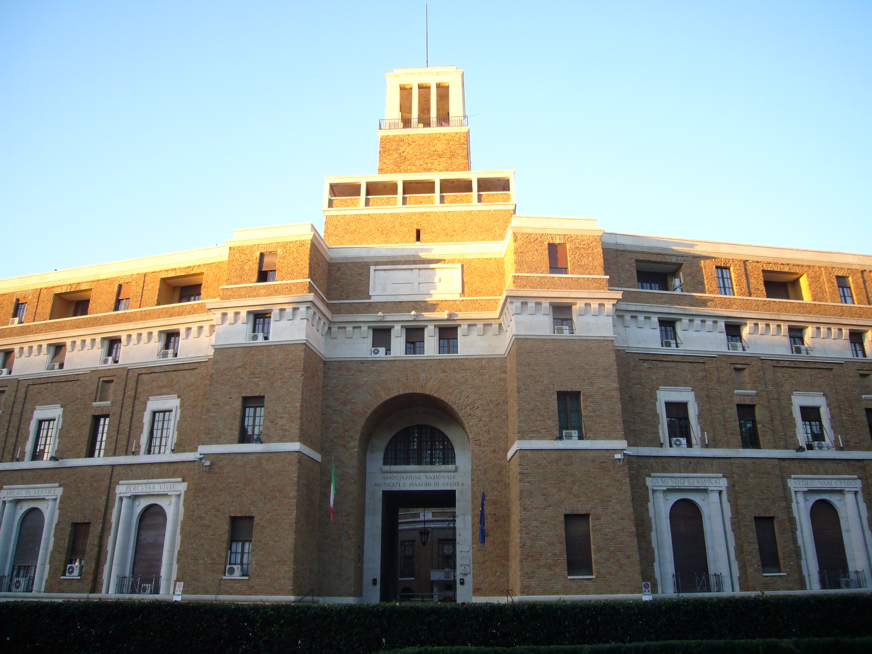 Roma, sede dell'Associazione nazionale Mutilati e Invalidi di guerra (Marcello Piacentini, 1925-1937), facciata verso Lungotevere Castello